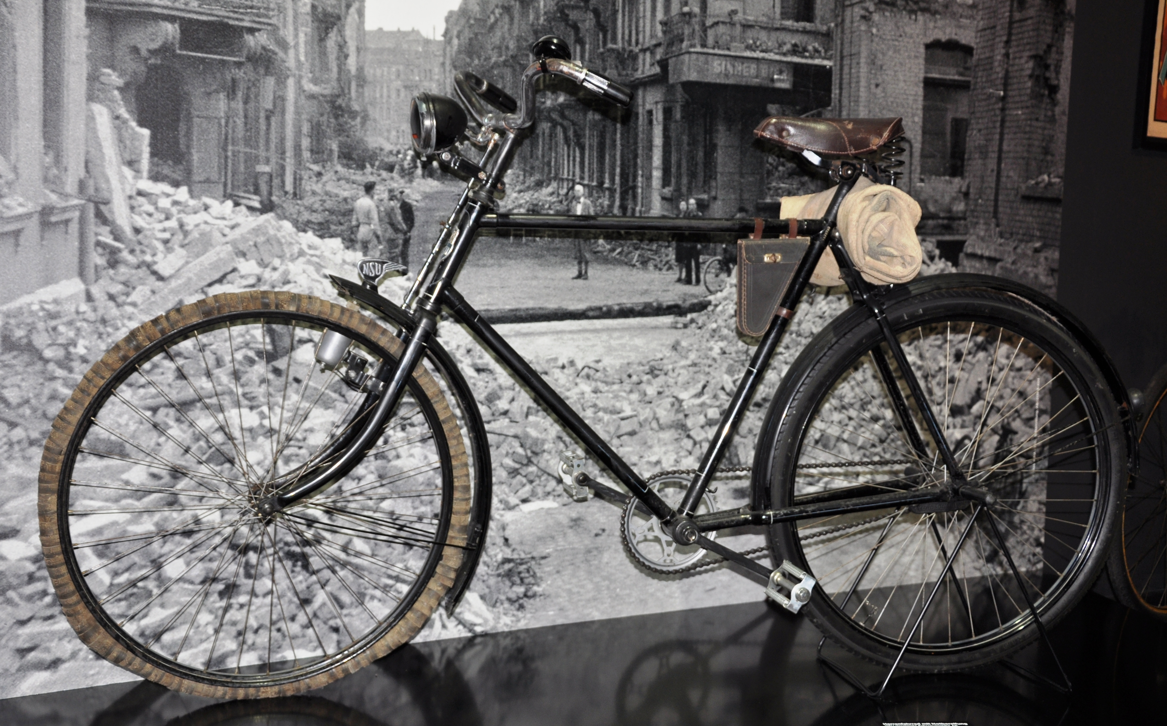 NSU-Herrenfahrrad mit Notbereifung The making of this document was supported by the Community-Budget of Wikimedia Germany.